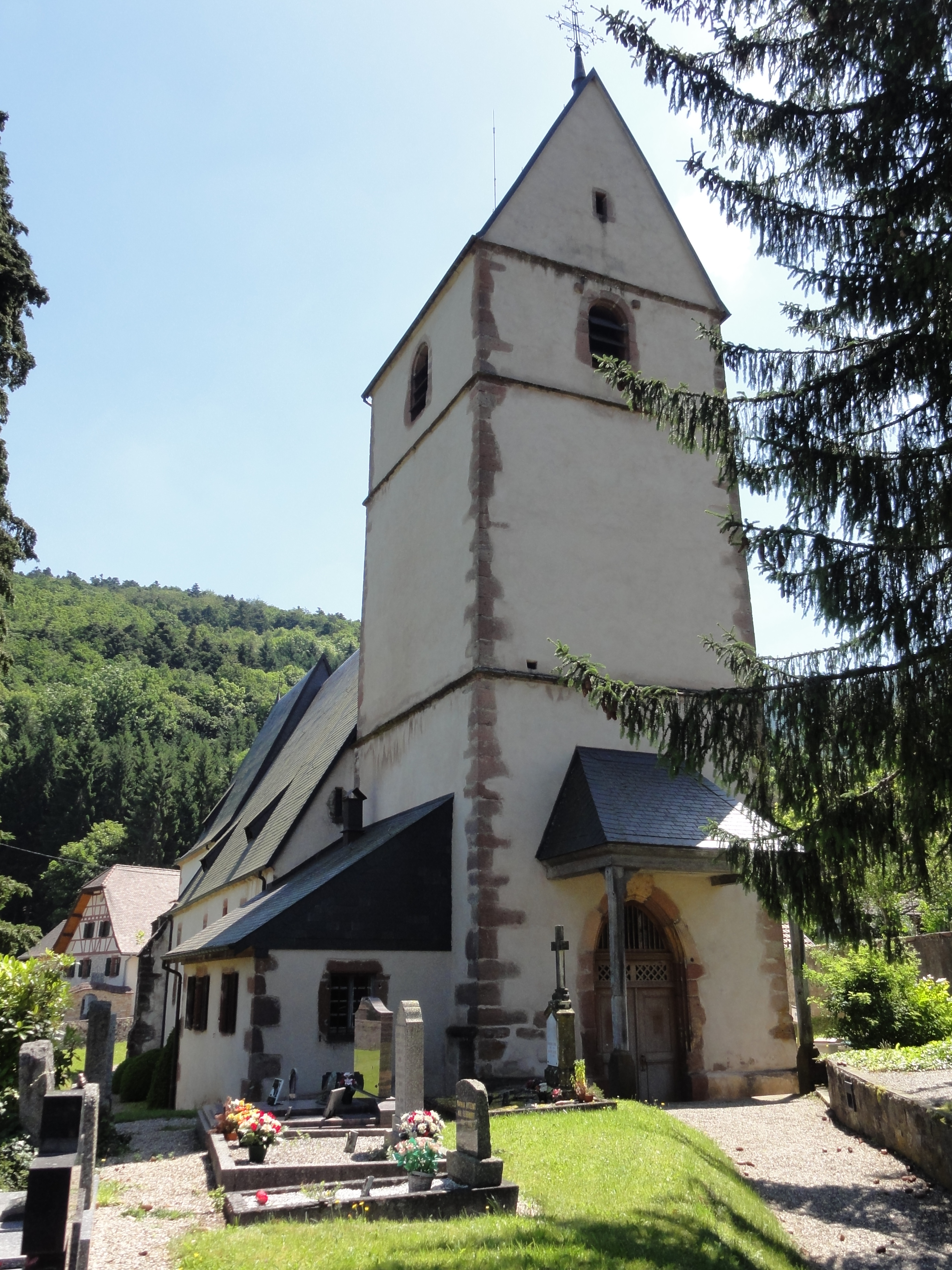 Alsace, Haut-Rhin, Sainte-Marie-aux-Mines, Église Saint-Pierre-sur-l'Hâte (XVIe-XVIIe), chemin Saint-Pierre-sur-l'Hâte It is indexed in the Base Mérimée, a database of architectural heritage maintained by the French Ministry of Culture, under the references PA00085664 and IA68007568.